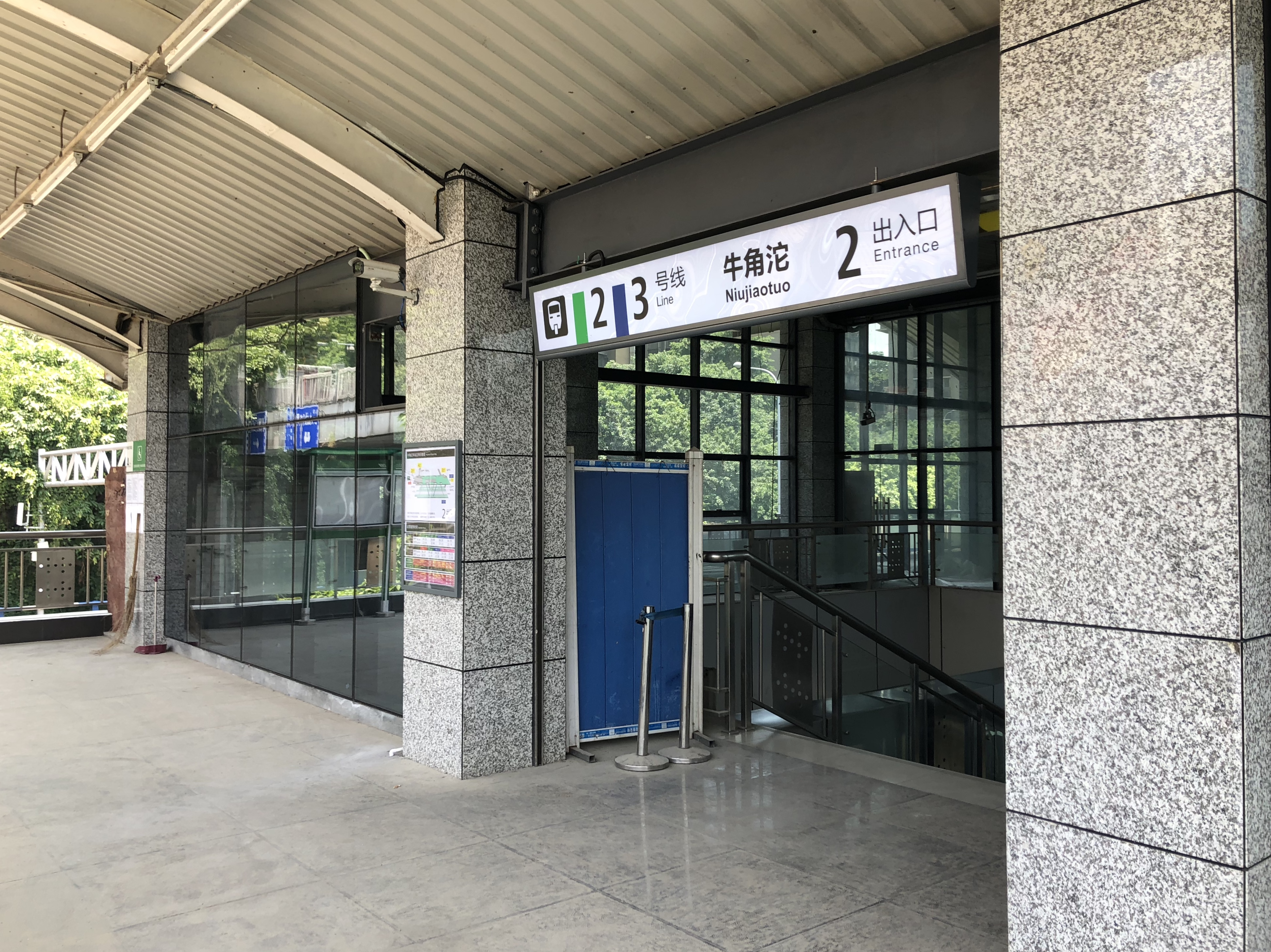 中文（中国大陆）: 2号线牛角沱站2出口（经字母出口修改）